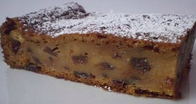 Fetta di torta Macafame